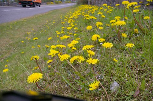 Bu ymylon y lonydd yn drwm o ddant y llew yn 2010 - son dros Gymru.